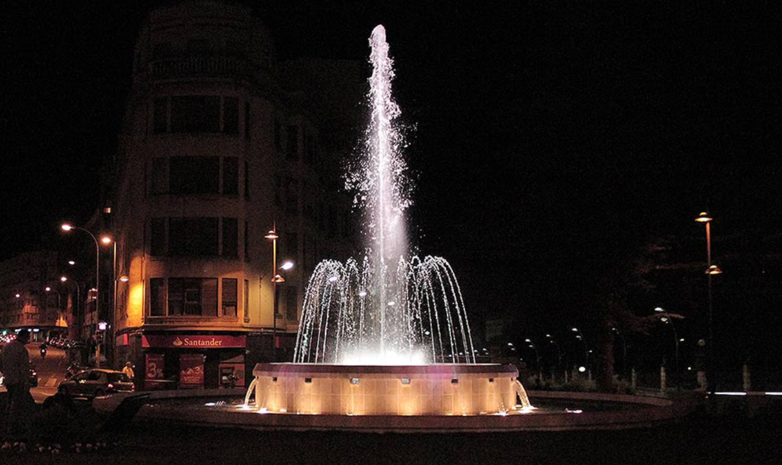 Fuente Luminosa de Soria.